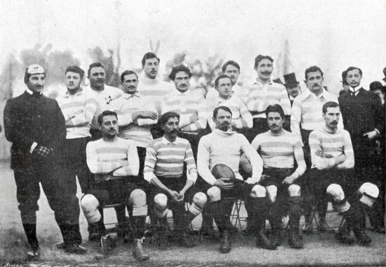 Le Racing Club de France en décembre 1899 à Paris (contre le London Irish FC) - Debout, de gauche à droite : JOBERT, ERTZBISHOFF, Paul MURET, Emile SARRADE, LEFÈVRE-HUBERT, GOUDARD, Vladimir AÏTOFF, Alexandre PHARAMOND, LEFÈVRE, Jean COLLAS, Robert BERNSTEIN, Charles GONDOUIN. - Assis : Etienne LESAGE, CHASTANIÉ, Frantz REICHEL (cap), Henri TAUZIN, Cyril RUTHERFORD.